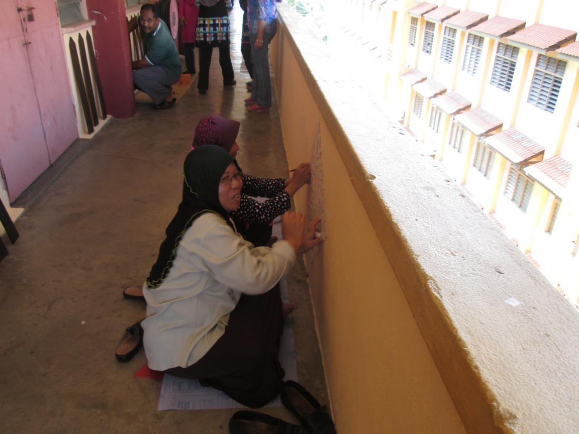 Proses Sebelum 8